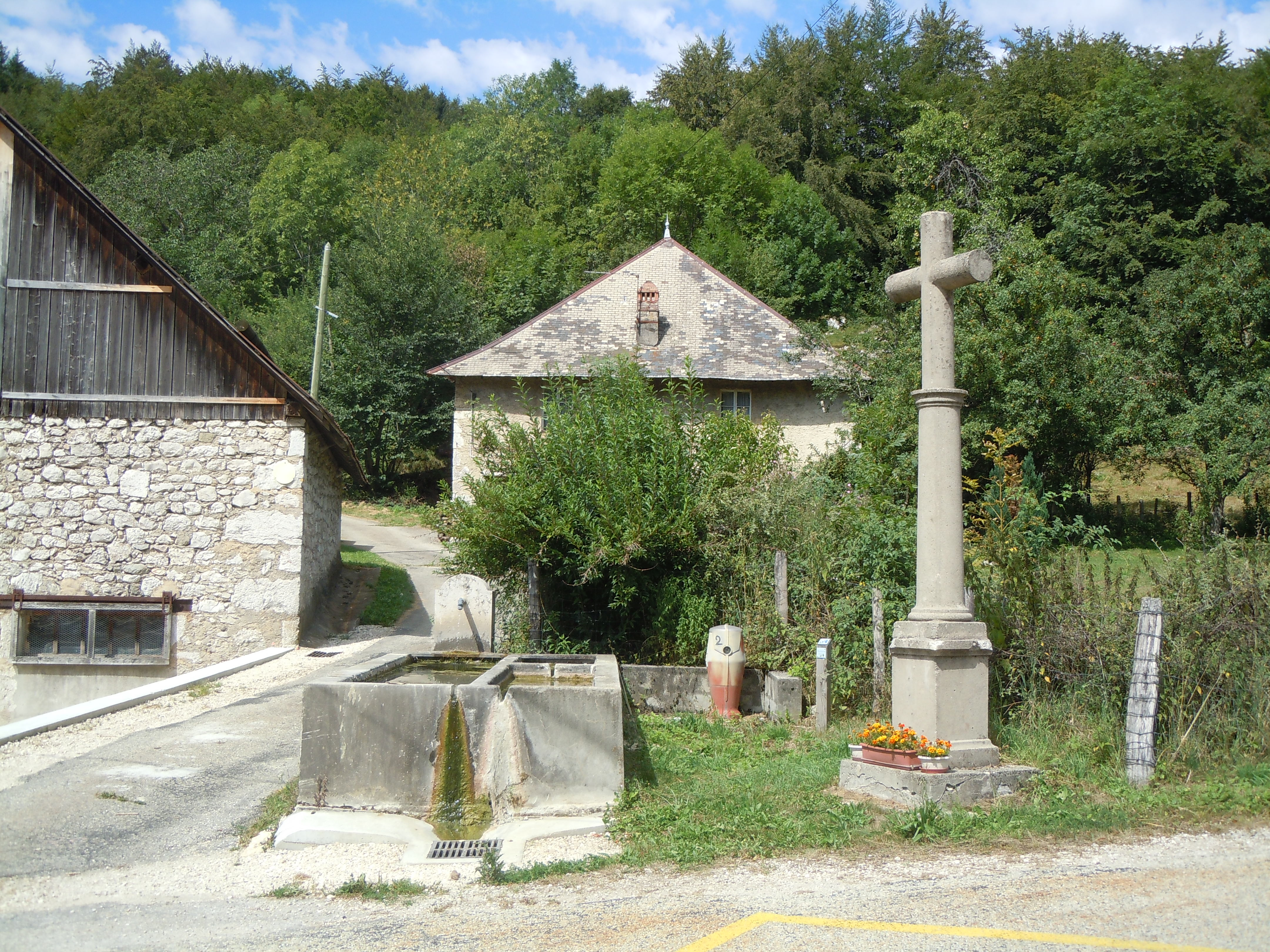 Croix des Bozons - Les Egaux - Corbel (Savoie)